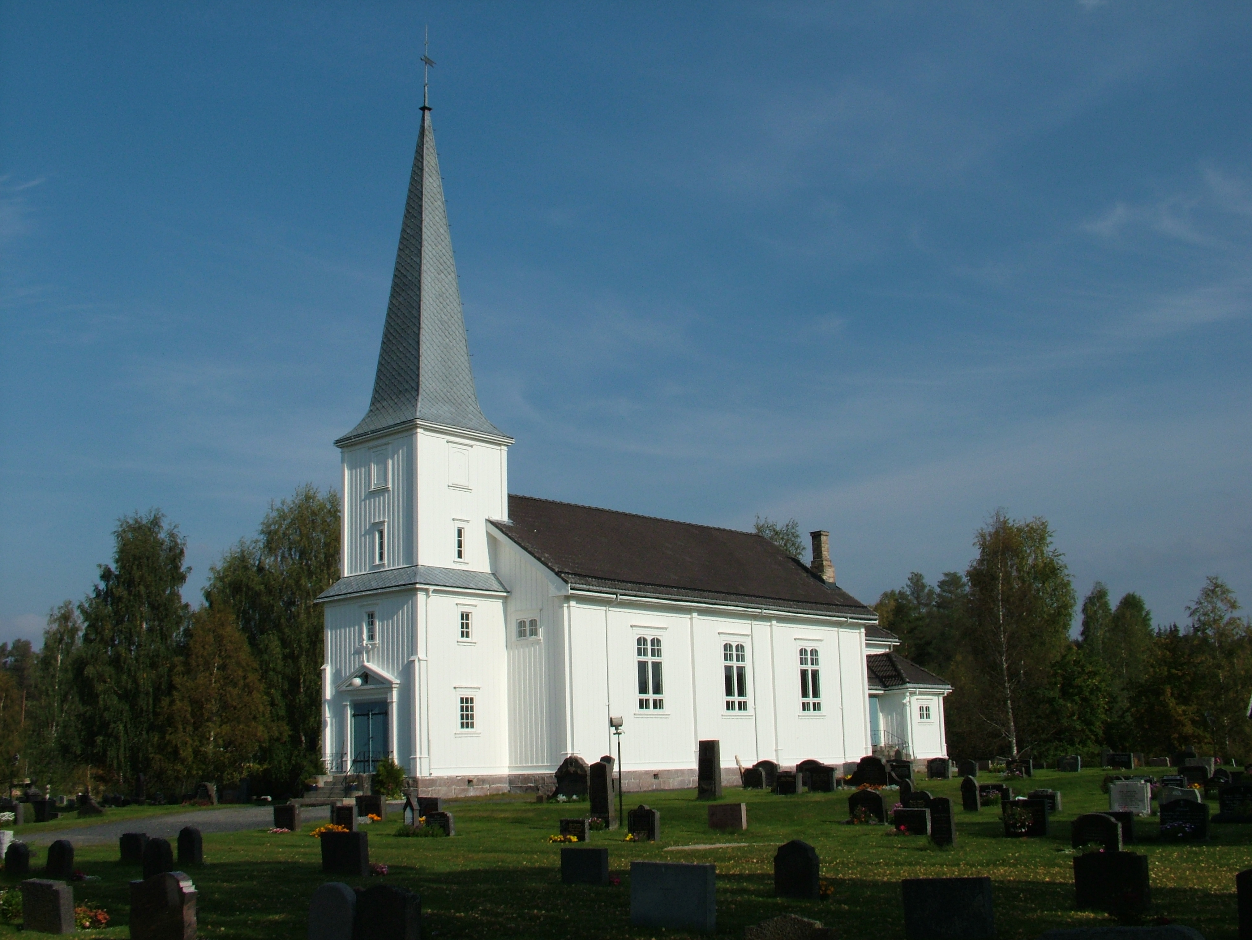 Åsnes Finnskog kirke. Norway